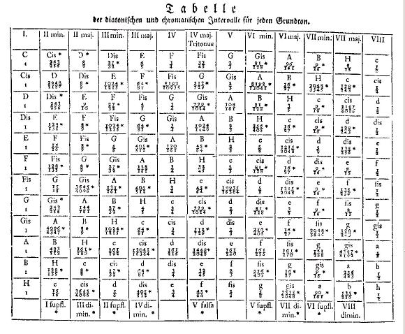 De Johann Philipp Kirnberger (mort)